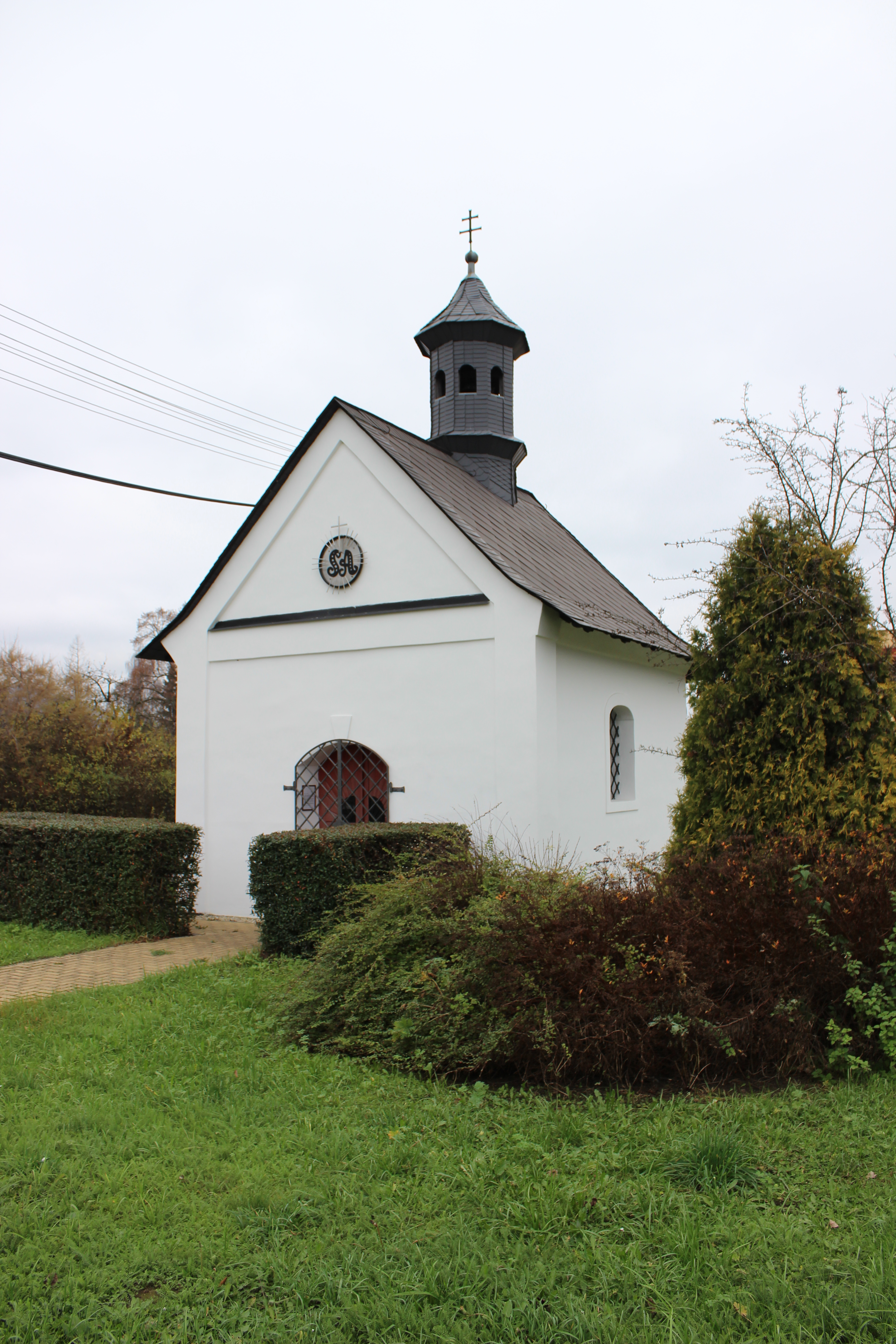 Kaplička ve Vikýřovicích.